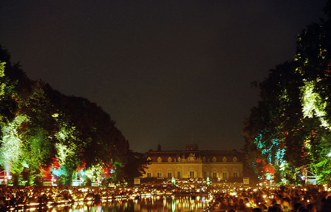 Schloss Benrath, Südseite mit Spiegelweiher, aufgenommen während des Schlosskonzerts 2003